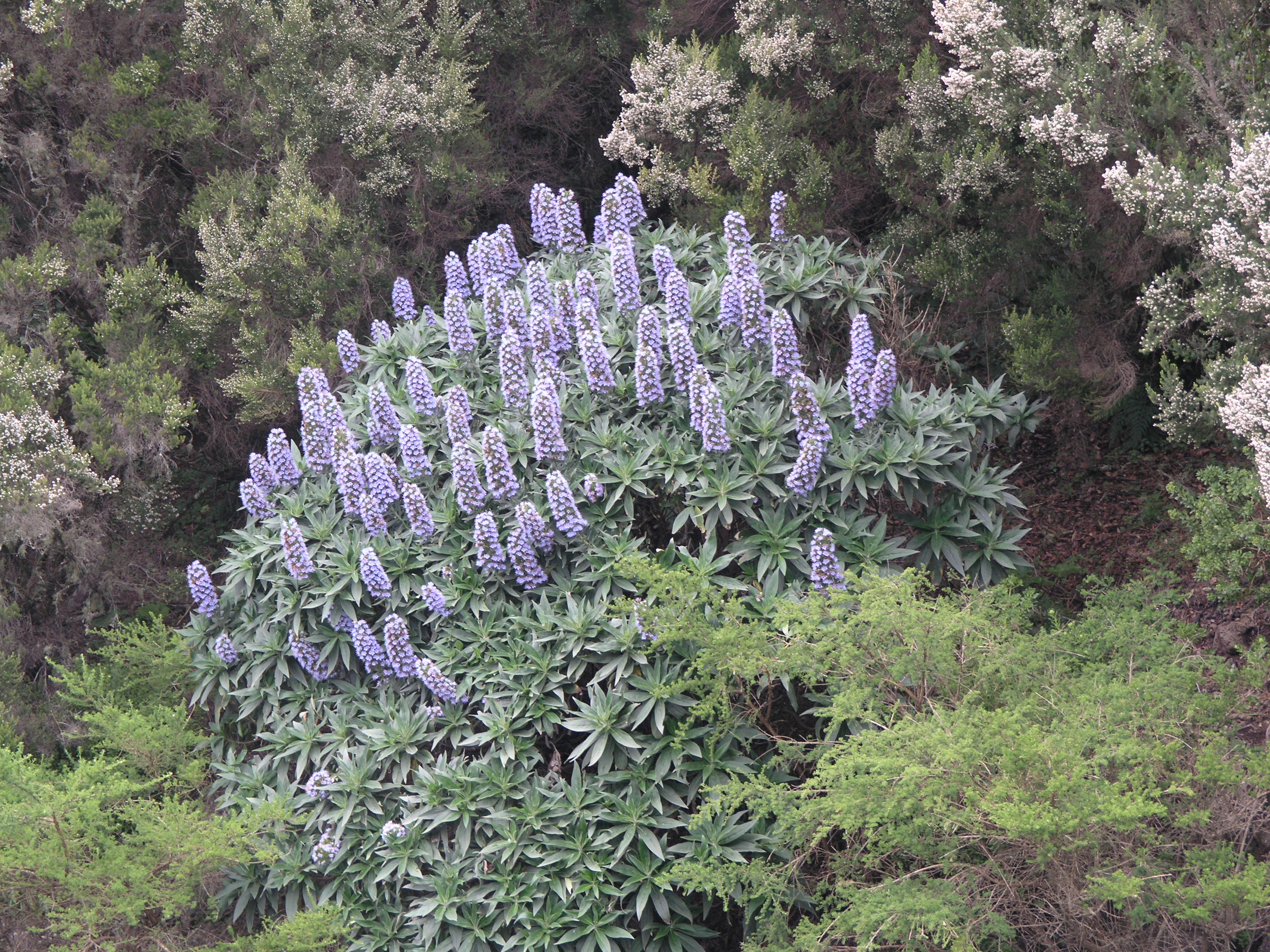 Tajinaste de La Gomera